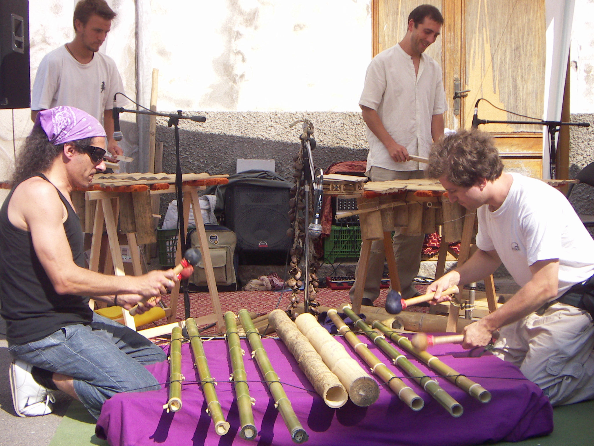 percussions de bambú de Herbert de Miranda a la cabanyada de l'Empordà